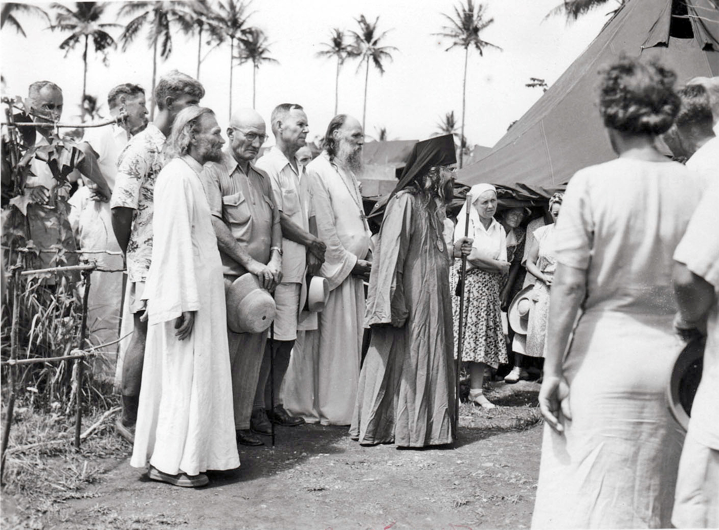 Архиепископ Иоанн с прихожанами на острове Тубабао на Филиппинах перед входом в палаточный храм на острове Тубабао